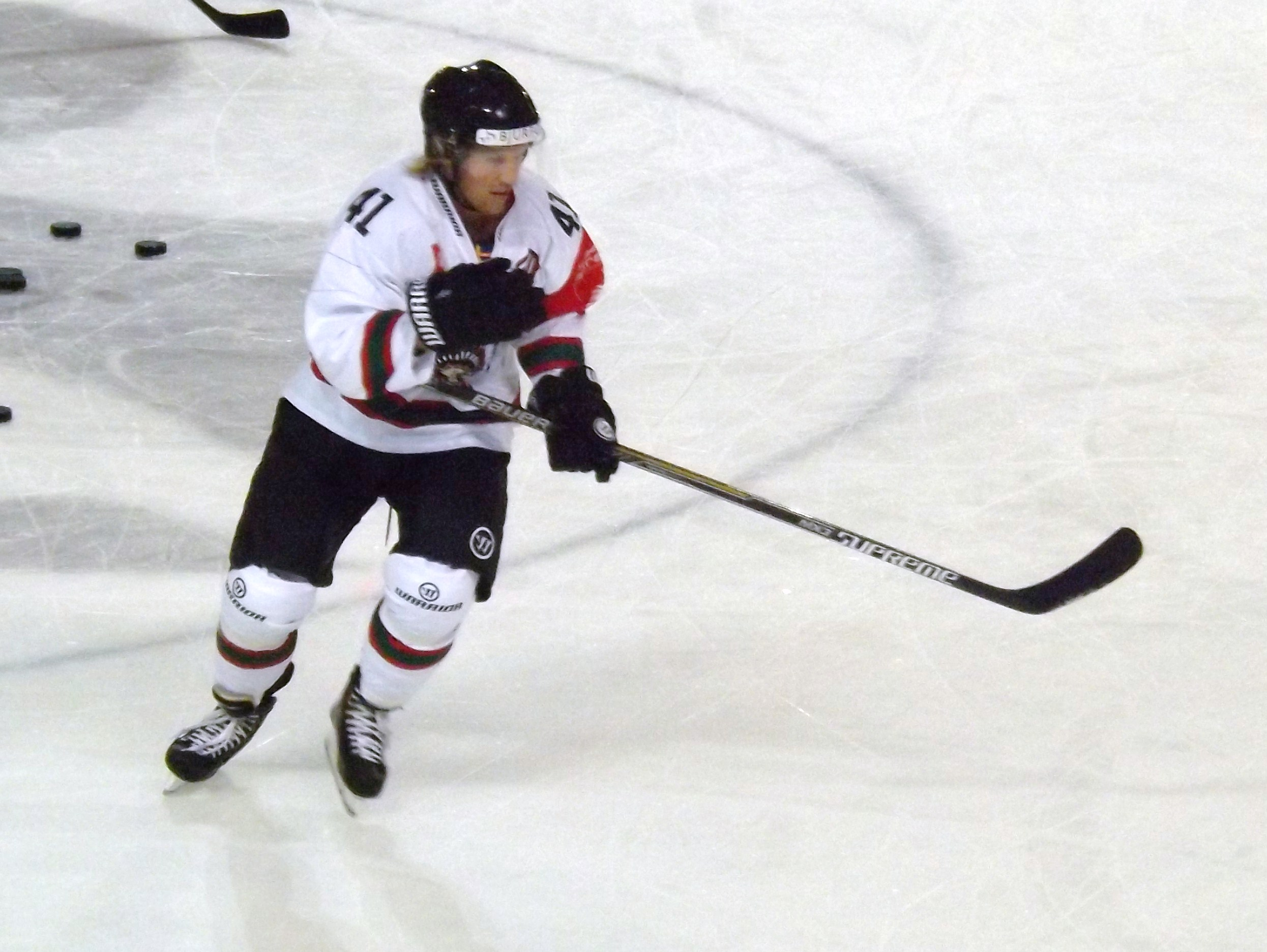 Joueur de hockey sur glace Frölunda Indians, CHL 2014